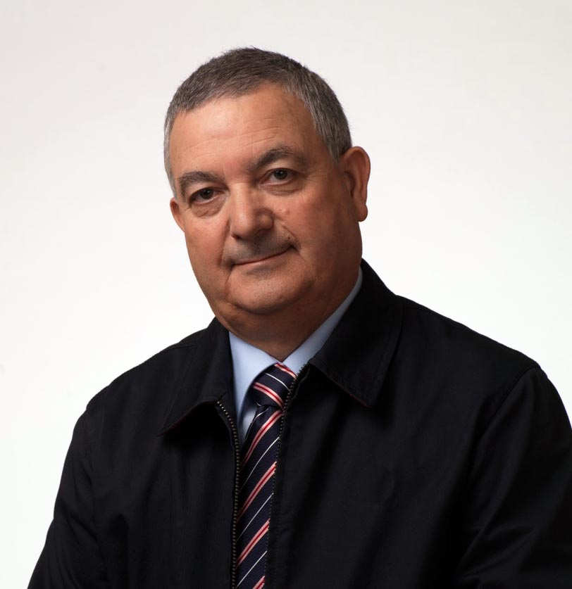 Miguel Buen.